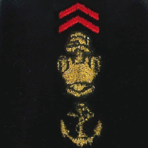 Attribut de fourreaux d'épaule du 6° régiment du génie